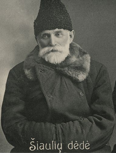 Postcard published by the bookstore of Marija Šlapelienė depicting Šiaulių Dėdė (Jonas Ambrozaitis) and Žemkalnis (Gabrielius Landsbergis-Žemkalnis)